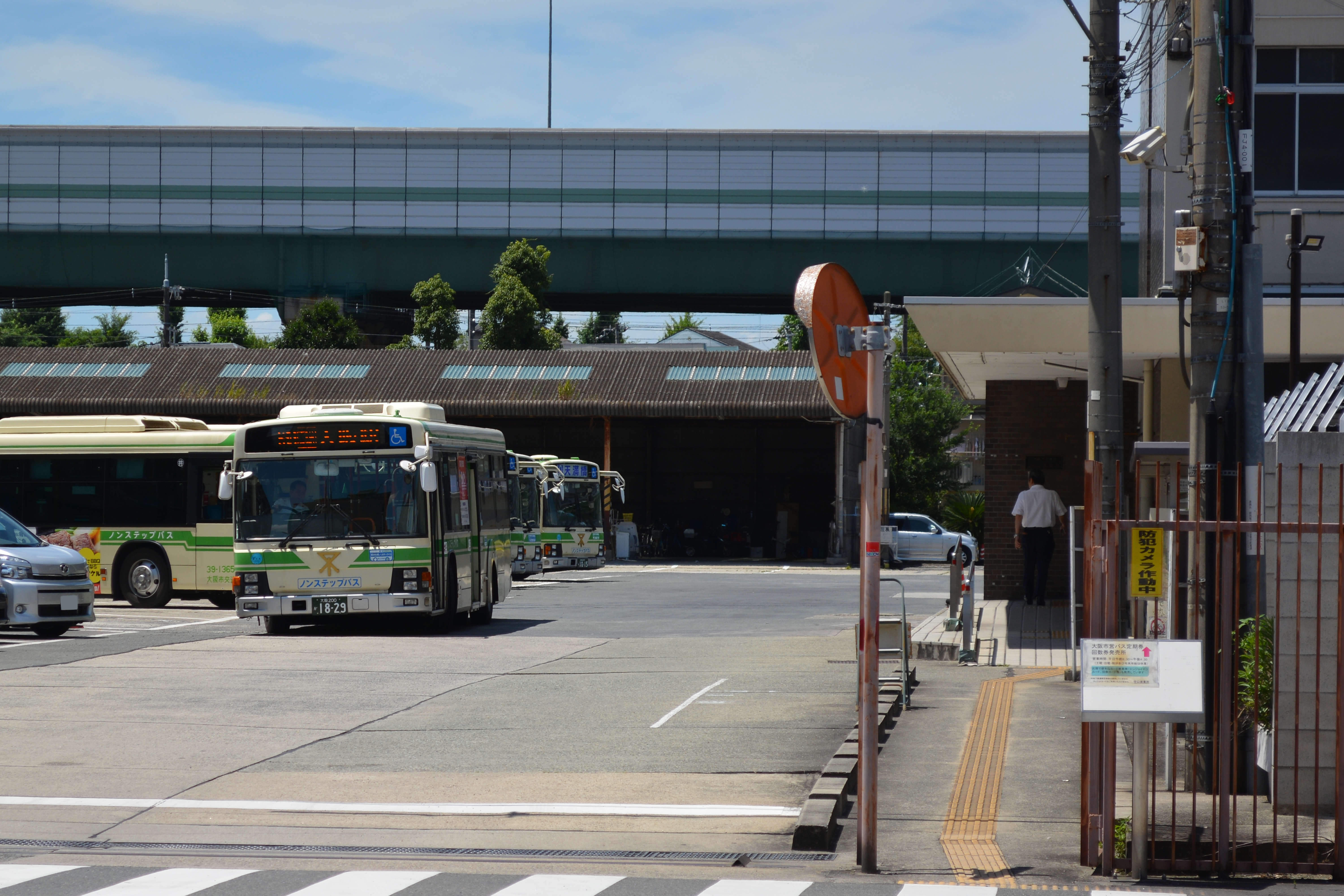 画像は一部加工しています。